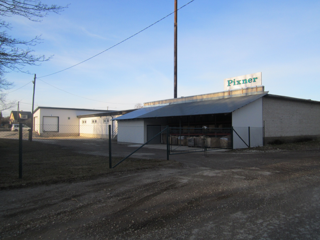 Vaade Pixner OÜ tootmishoonele Kauba tänavalt